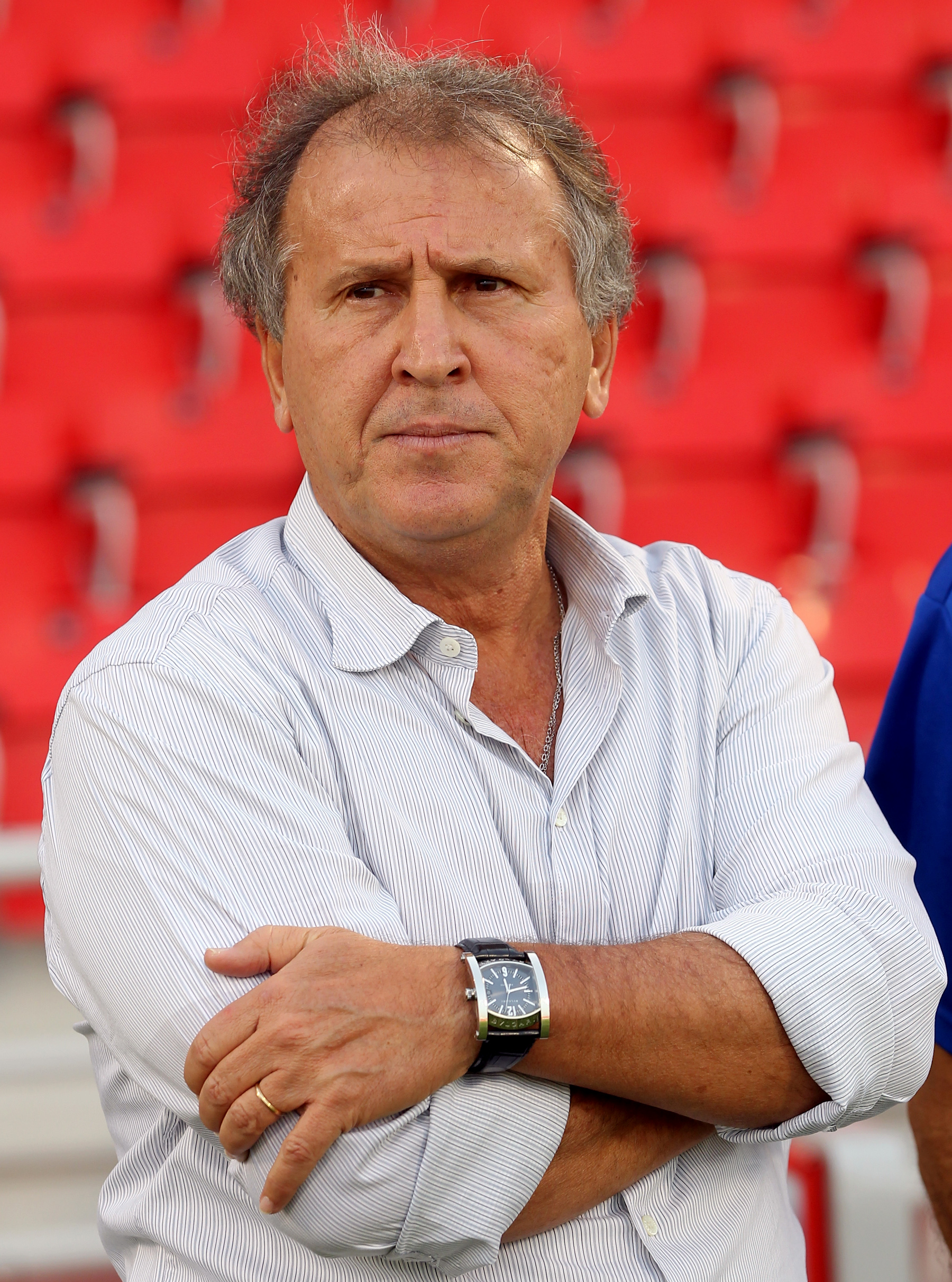 Зико в сборной Ирака